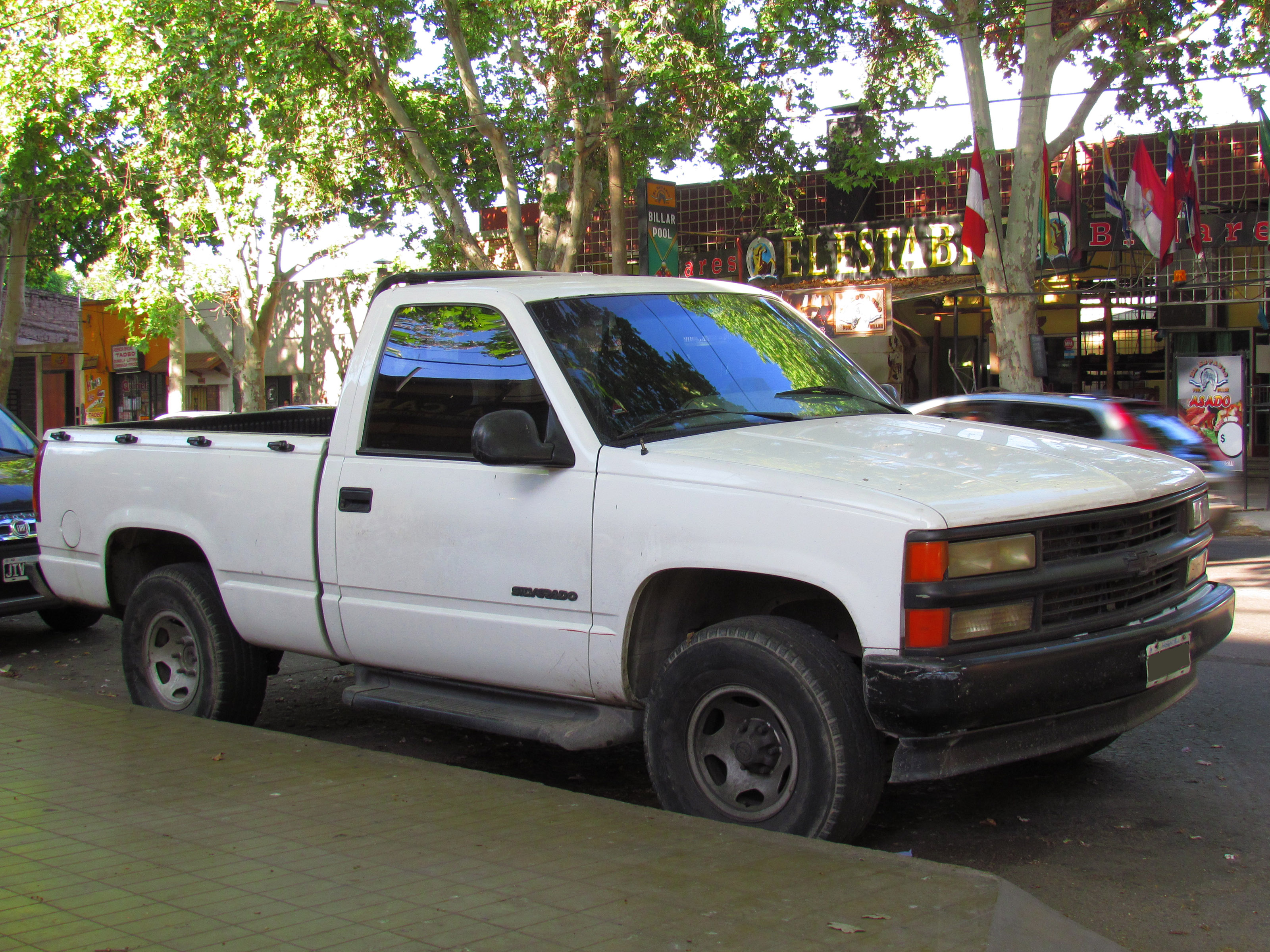 Chevrolet Silverado Turbo Diesel 1998